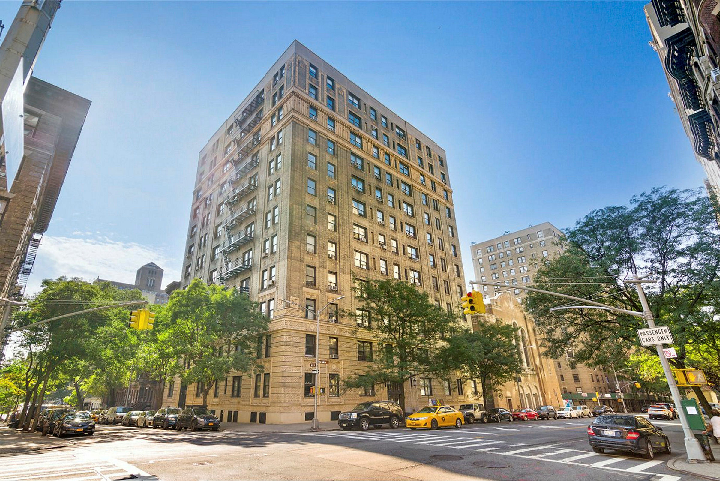 new york hyresrätter